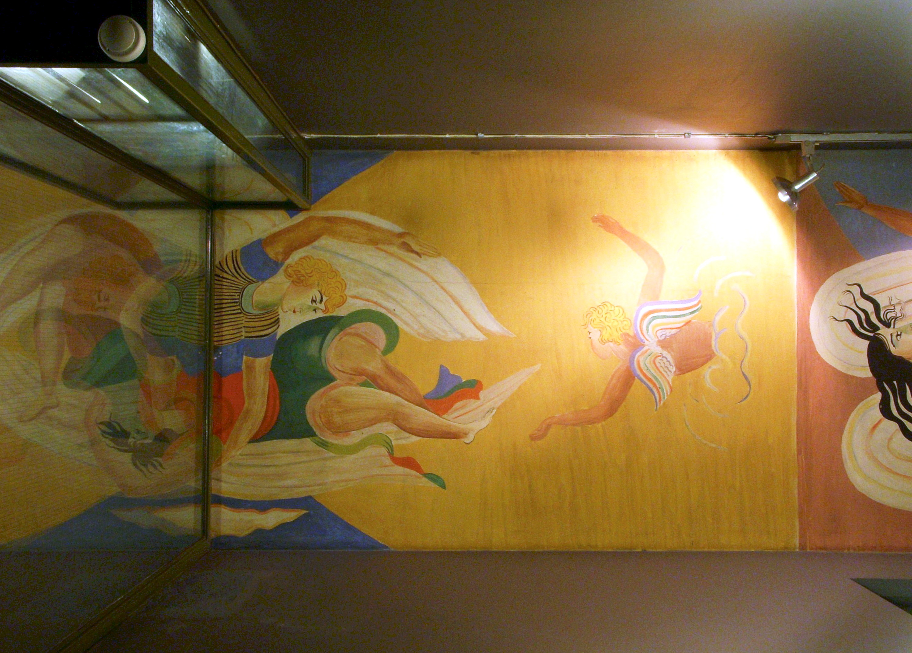 Skandia-Teatern i Stockholm, takmålning av Leander Engström (död 6 februari 1927)